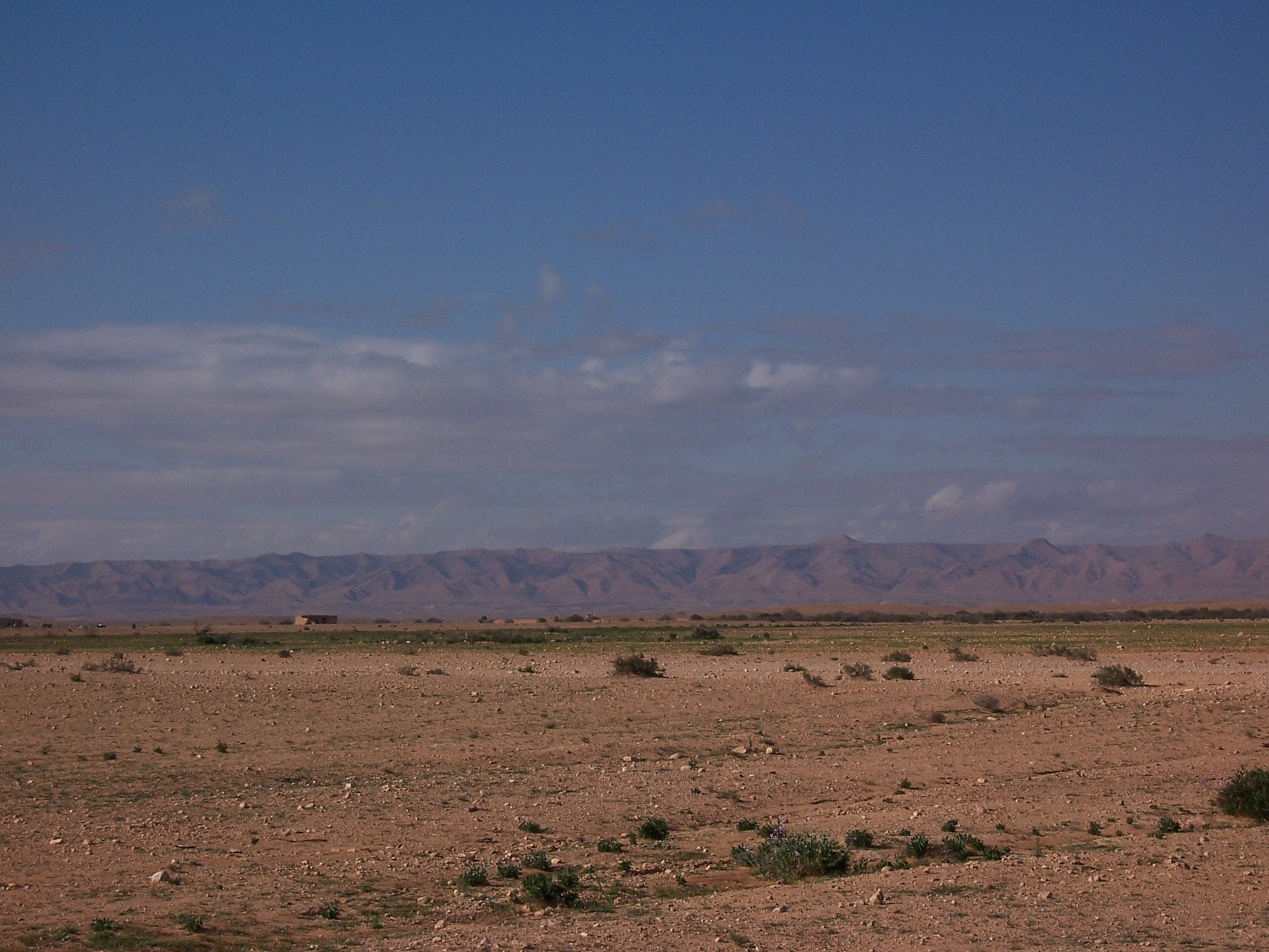 une vue sur le désert algérien